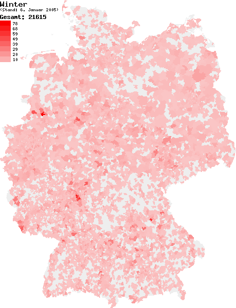 Verteilung des Nachnamens Winter in Deutschland nach dem Telefonbuch mit Stand vom 6. Januar 2005